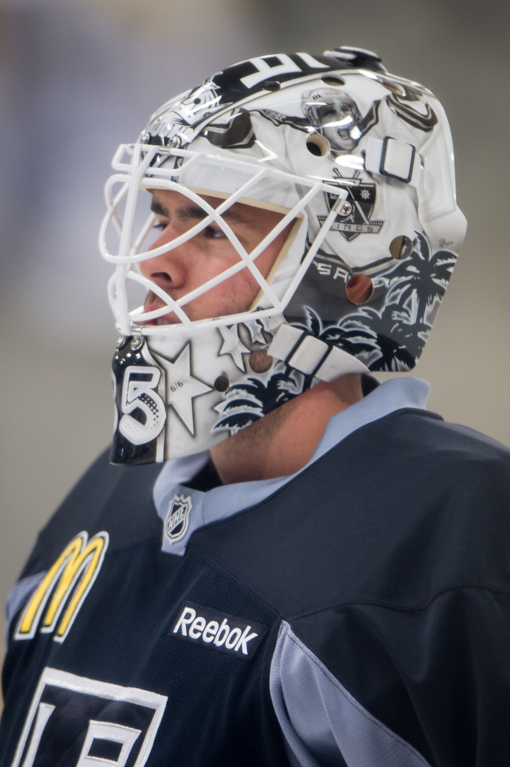 Jean-François Bérubé, Canadian ice hockey goaltender